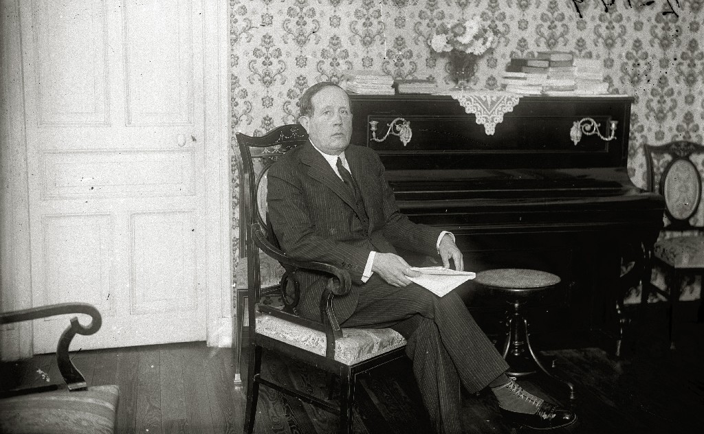 Título original: El escritor José Martínez Ruiz 'Azorín' sentado junto a un piano (1/1) Localización: Guipúzcoa